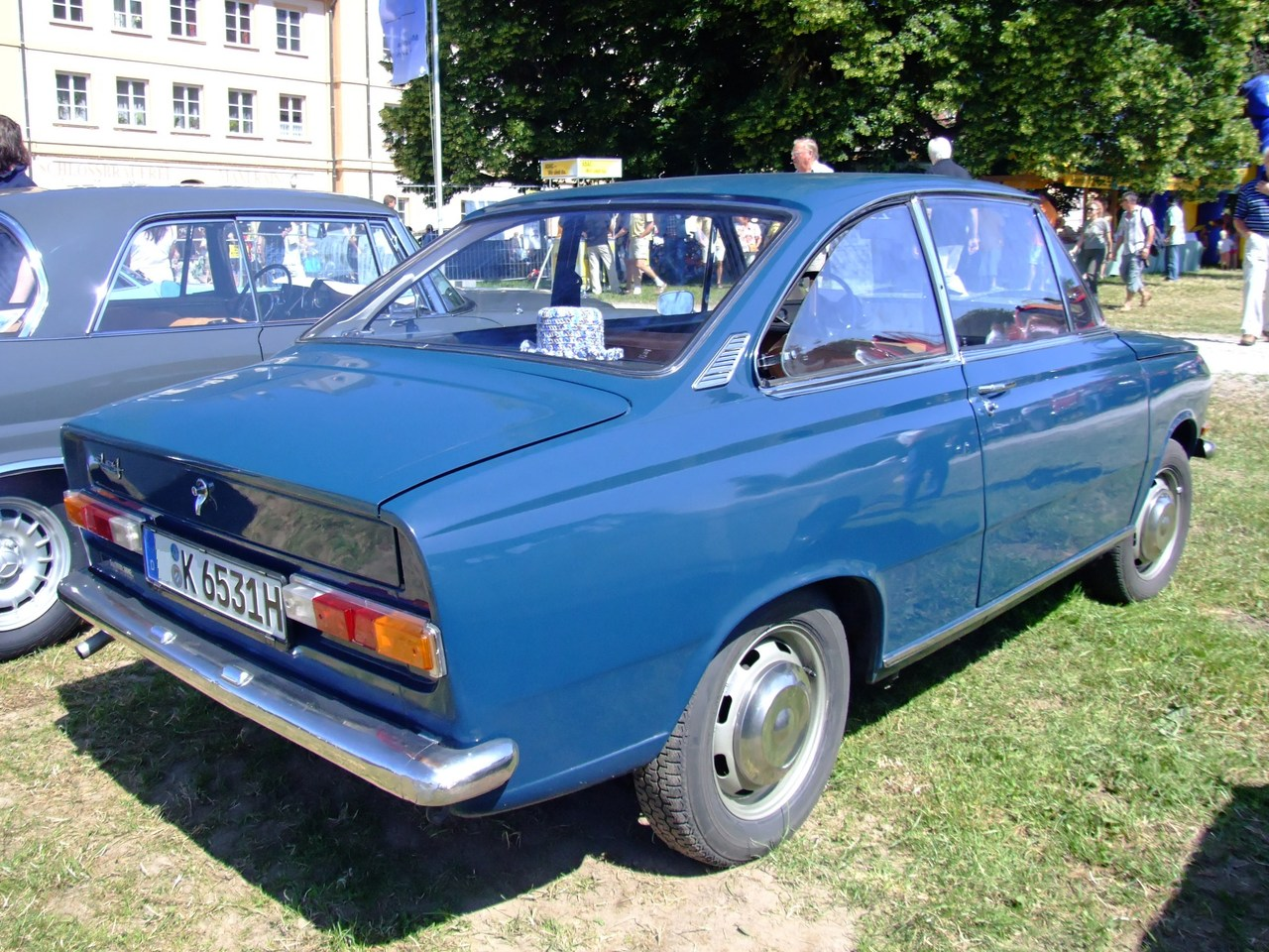 Quelle: selbst fotografiert, 06/2007 Fotograf: Späth Chr.